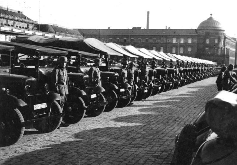 Straßburg, Parade der LKW